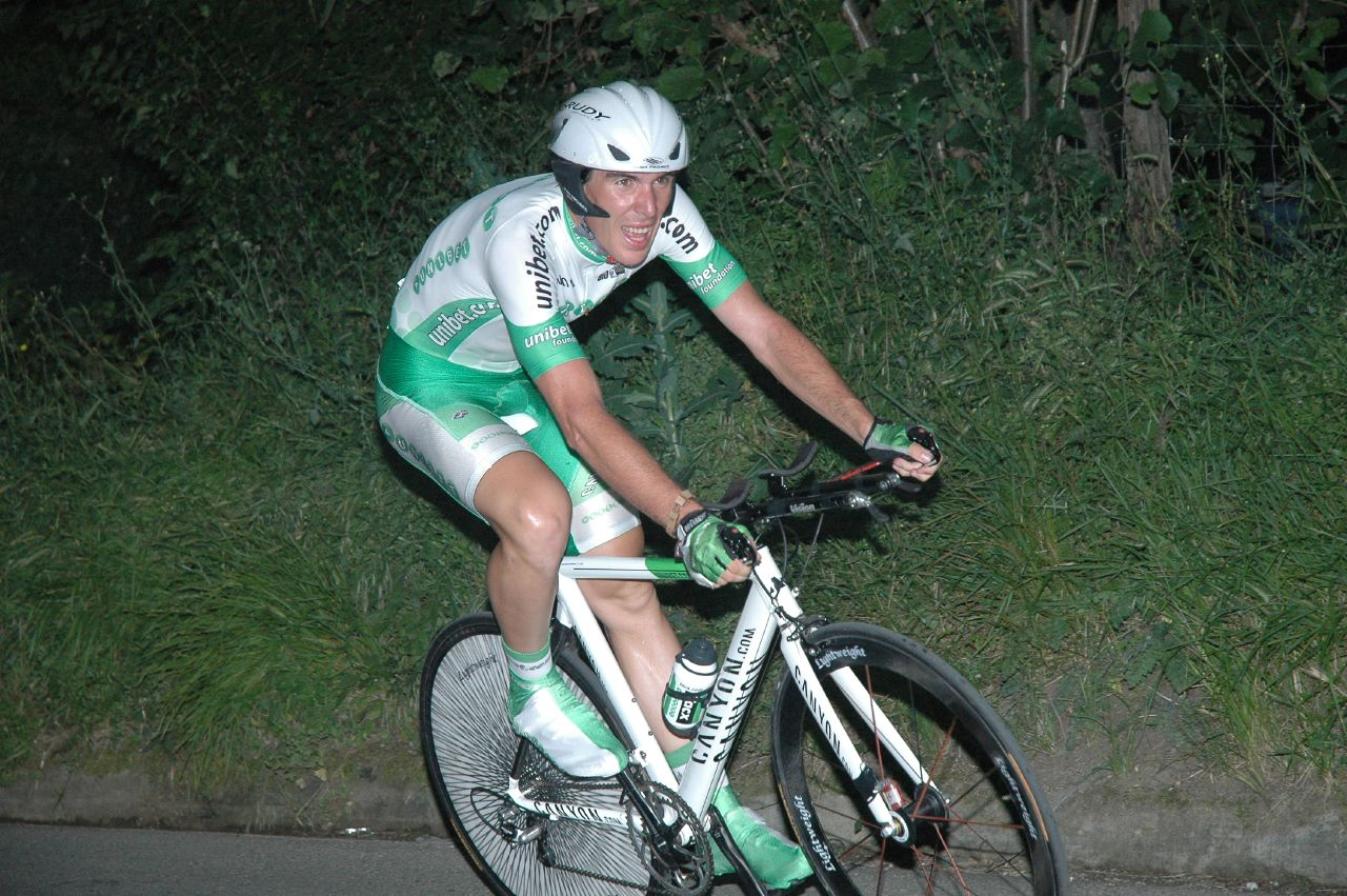 Luis Pasamontes, Euskal Bizikleta 2007